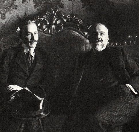 Il principe Guglielmo di Wied (Wilhelm Friedrich Heinrich zu Wied, 1876-1945) a sinistra e il marchese Antonino di San Giuliano (1852-1914) a Roma.